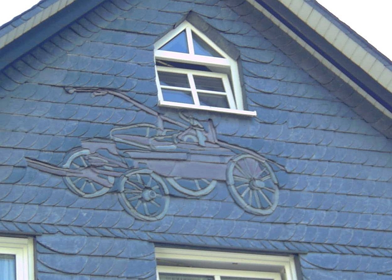 Schieferdesign "Löschwagen", in Schmallenberg-Fleckenberg, Feuerwehrhaus, Germany.